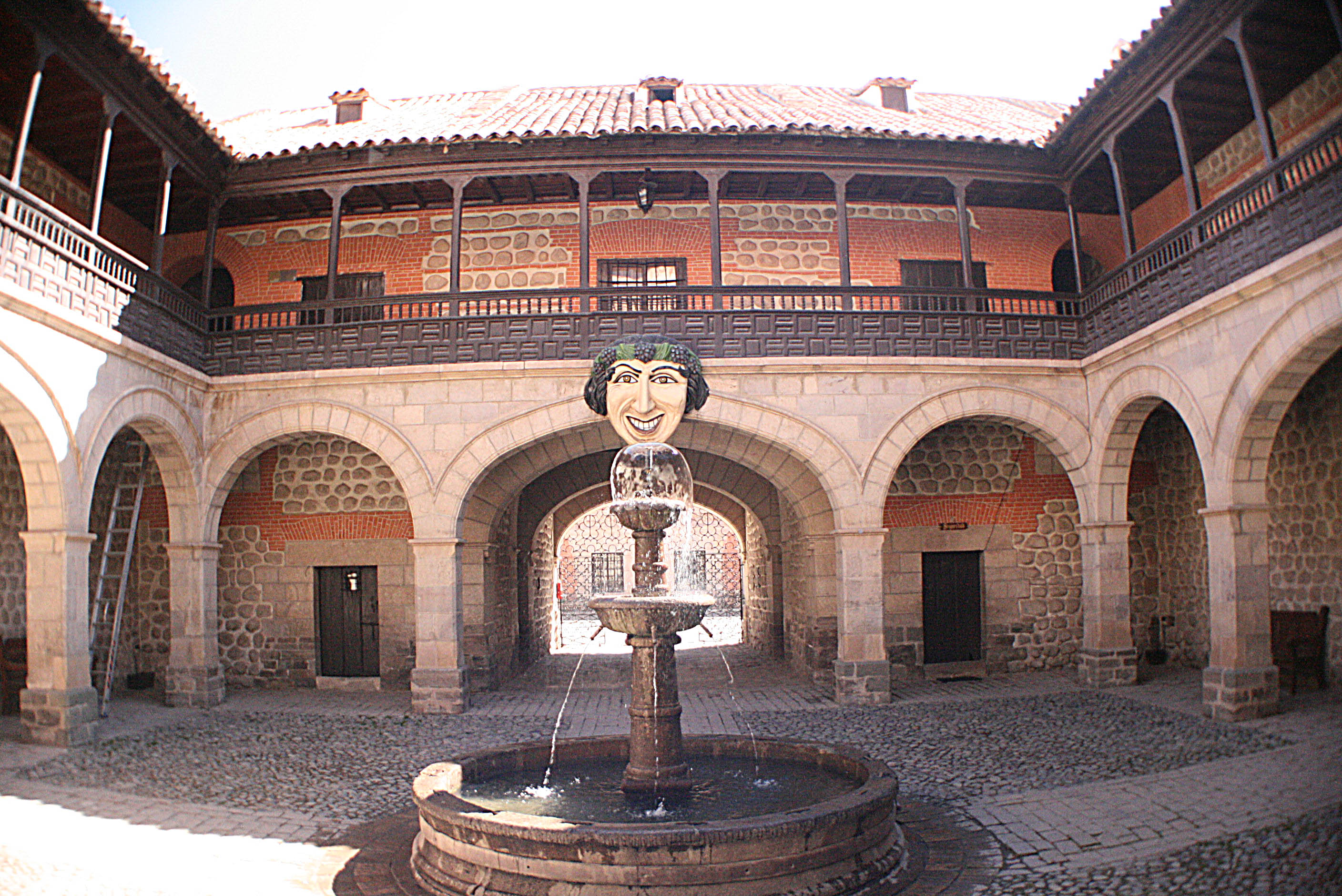 Patio de la Casa de la Moneda en Potosí, Bolivia.